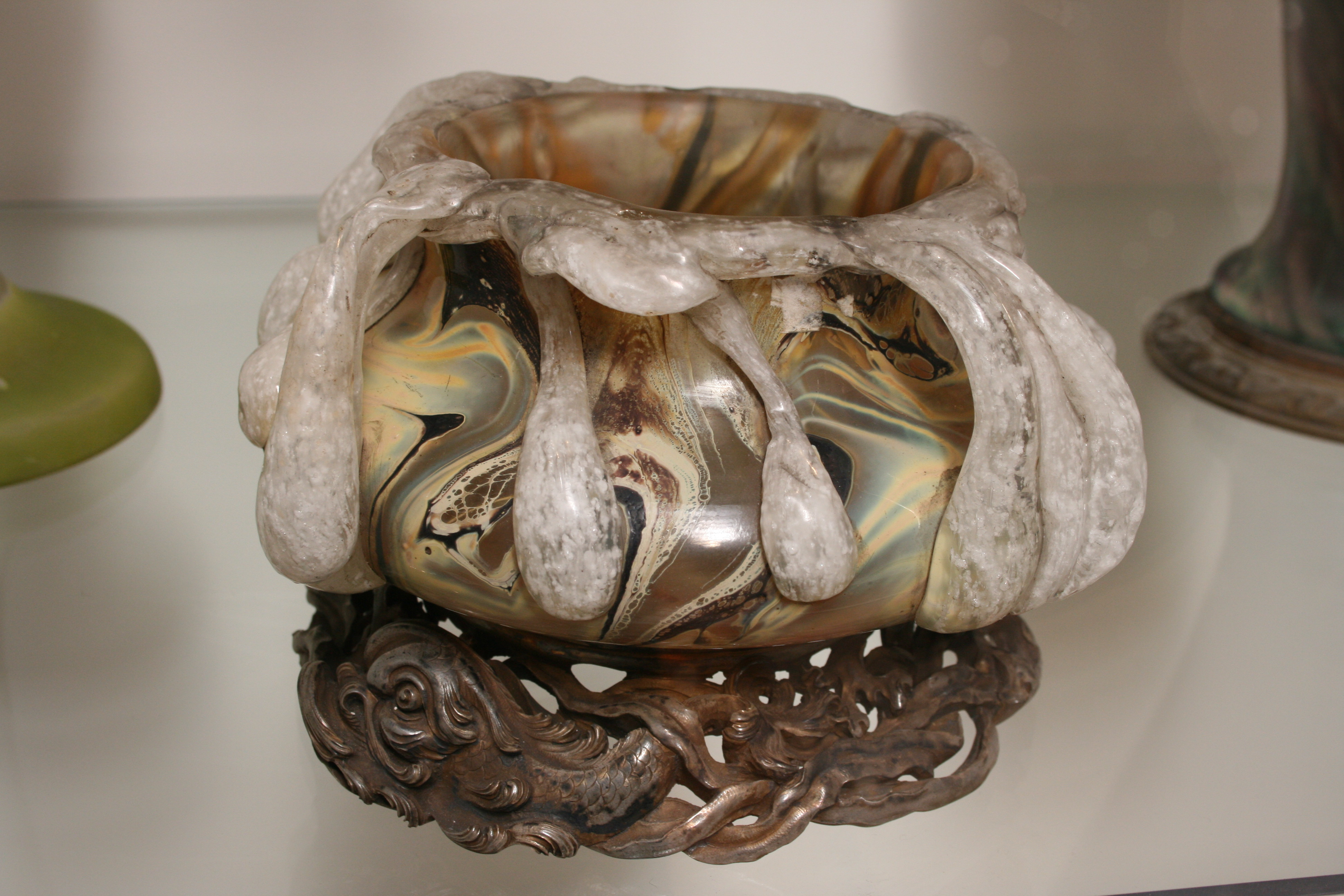 Work by Emile Gallé. Musée d'Art et d'Industrie. Roubaix; département du Nord, France